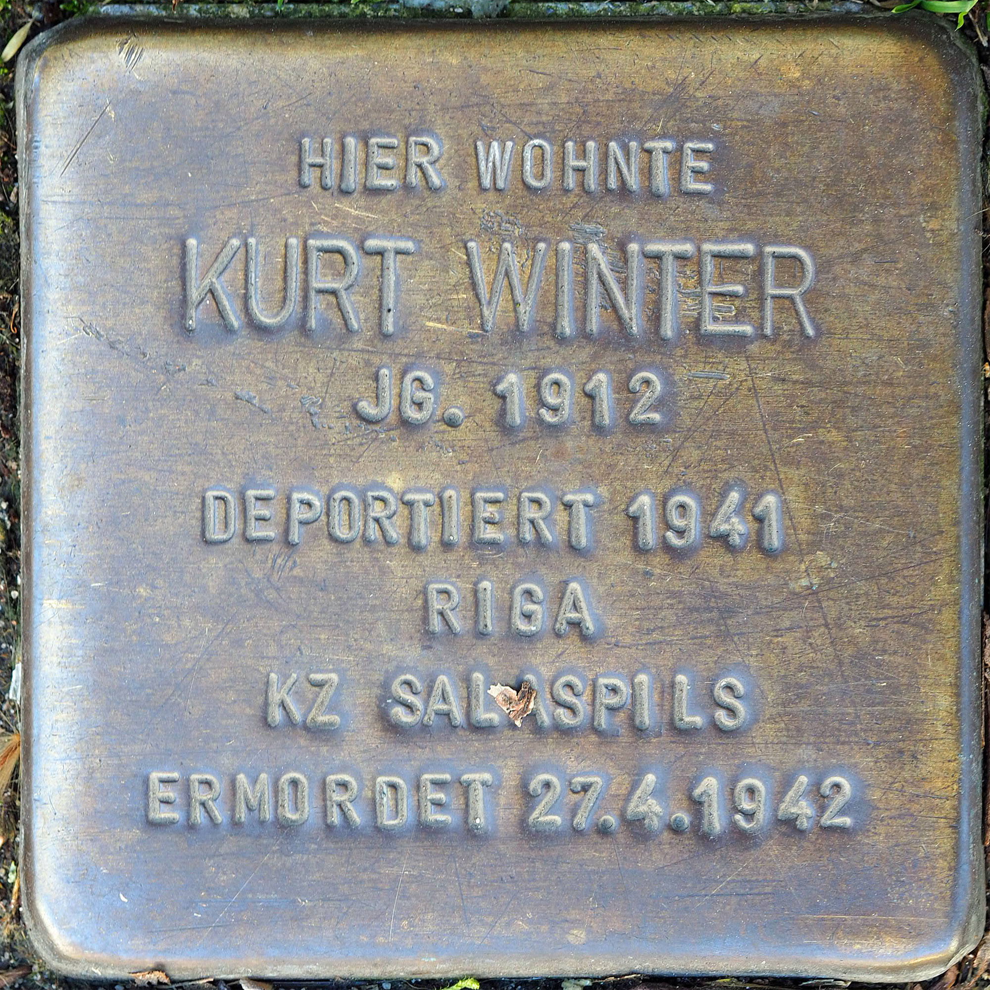 Stolpersteine Korschenbroich: Winterm Kurt